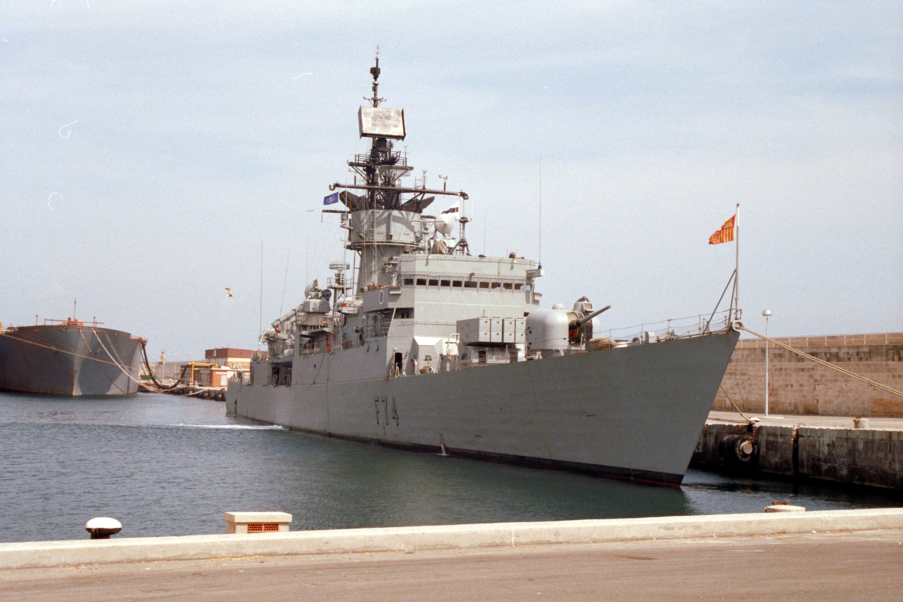 Fragata Asturias (F-74) de la armada Española